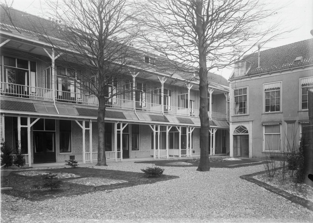 Tuinzijde Bethel ziekenhuis